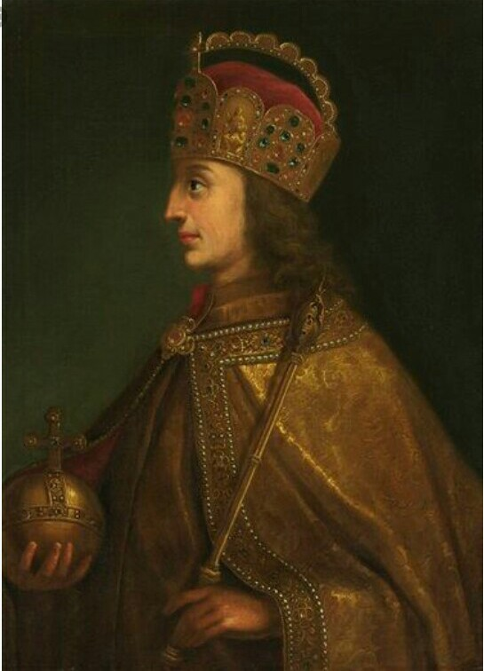 Ludwig der Bayer, Ludwig the Bavarian; Darstellung im Ornat des Kaisers des HRR